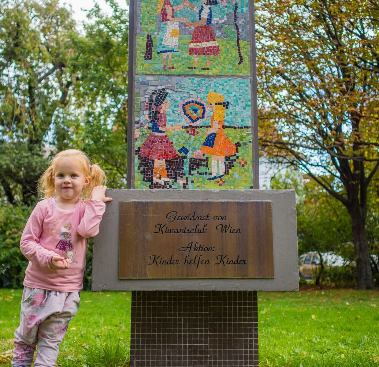 vom Kiwanisclub Wien errichtete Säule im Wiener Stadtpark die im Jahr 2016 renoviert wurde